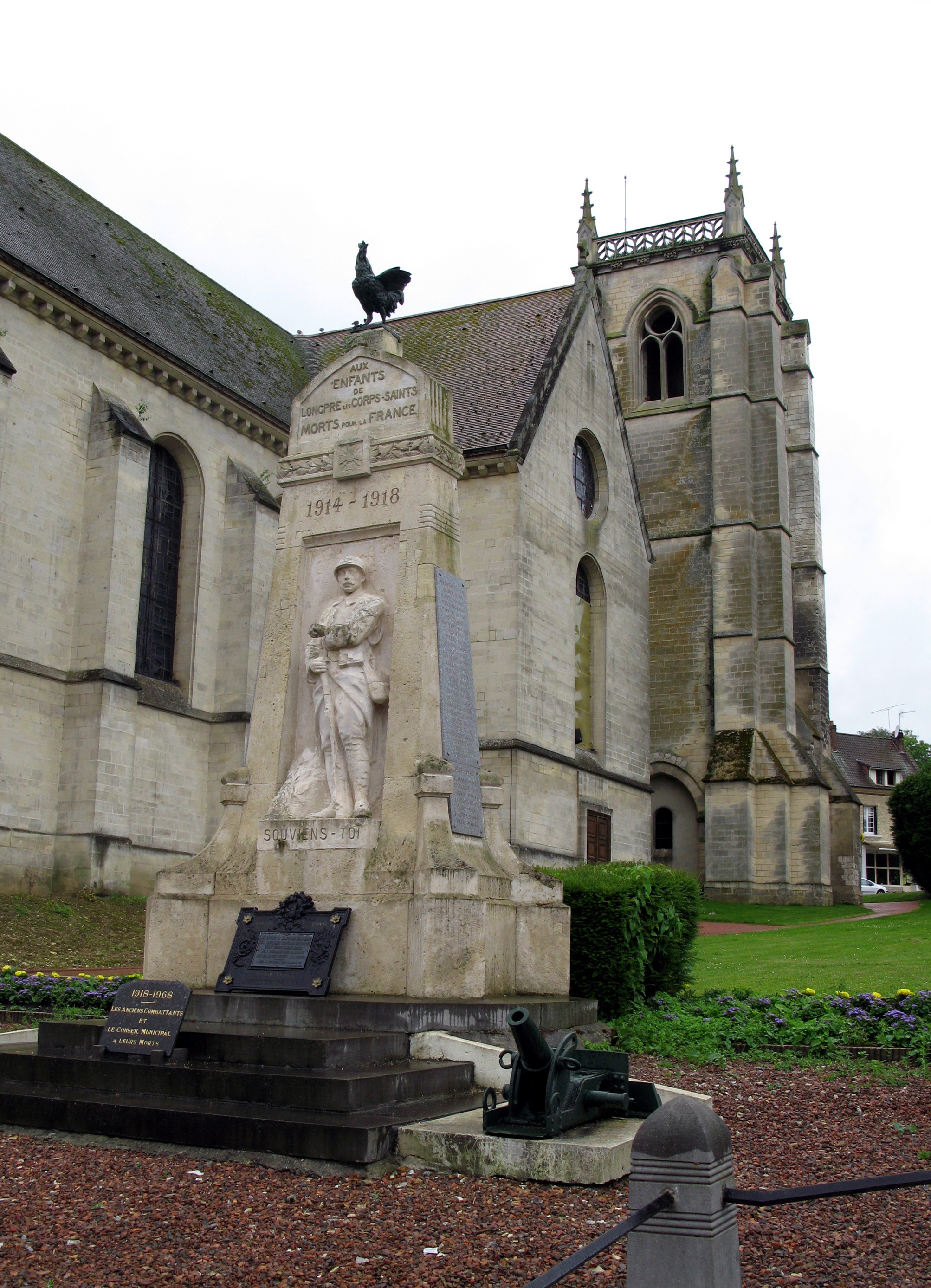 Longpré-les-Corps-Saints (Somme, France) - .